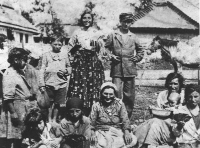 Die Roma-Lyrikerin und Sängerin Bronislawa Wajs, genannt "Papusza" und eine Roma-Gruppe (1930)